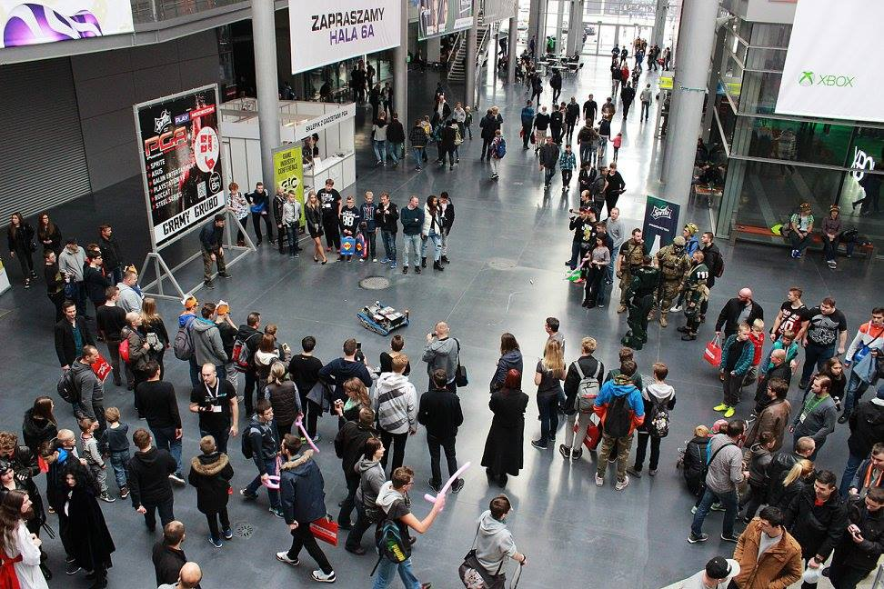 Robot drużyny Spice Gears 5883 na pokazach w Poznaniu.